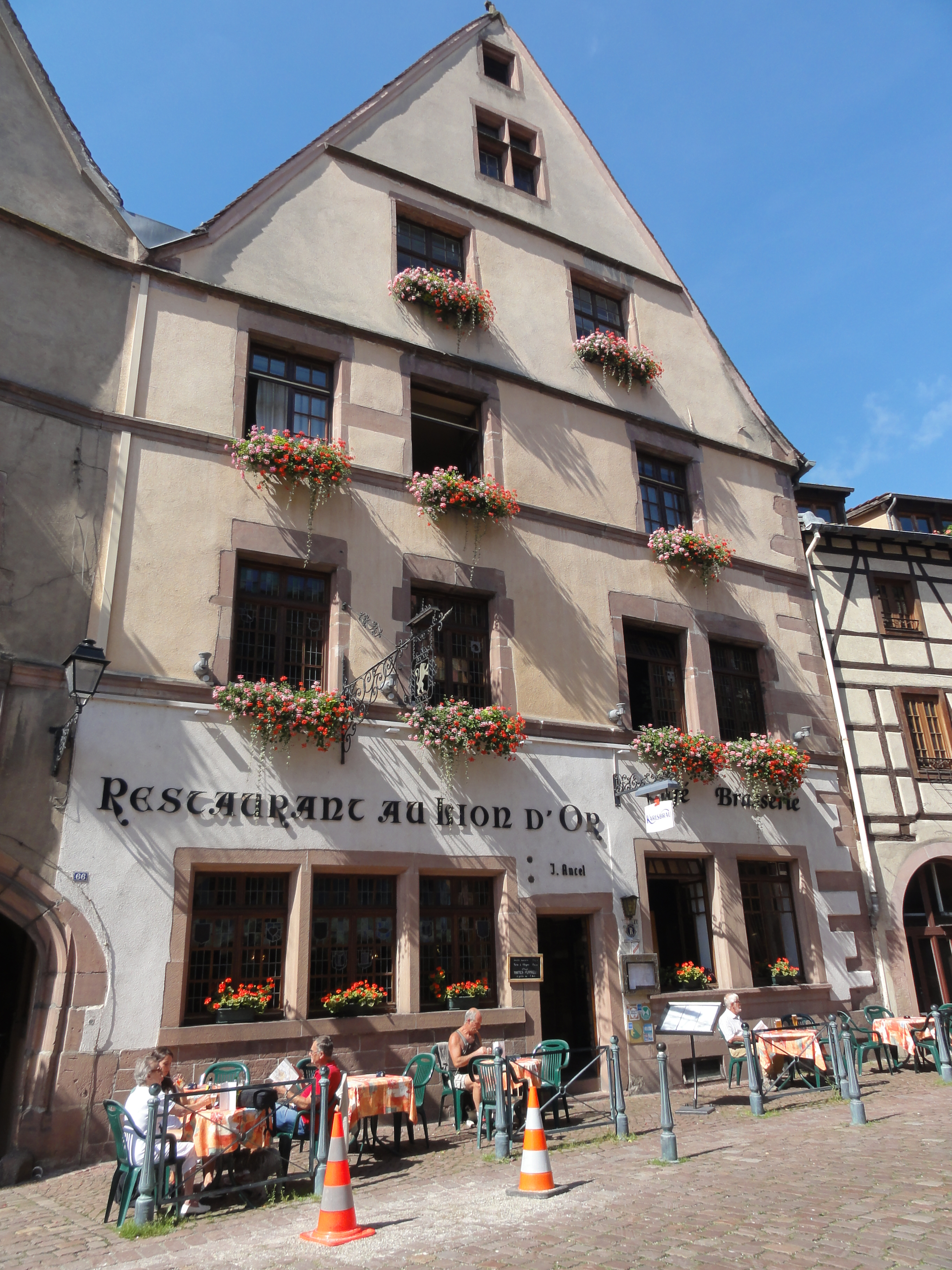 Alsace, Haut-Rhin, Kaysersberg, Maison de patricien, aujourd'hui restaurant (XVIe), 66 rue du Général-de-Gaulle. It is indexed in the Base Mérimée, a database of architectural heritage maintained by the French Ministry of Culture, under the references PA00085486 and IA68000639 .